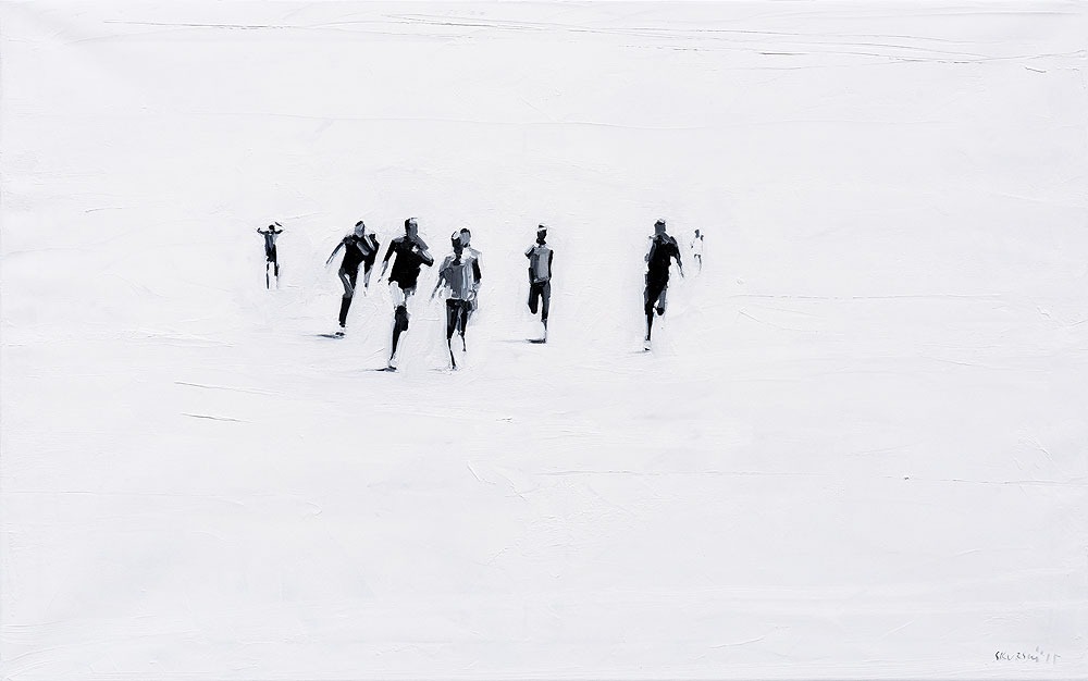 Leszek Skurski, Fernweh, 100x150 cm, Oil on Canvas, 2015